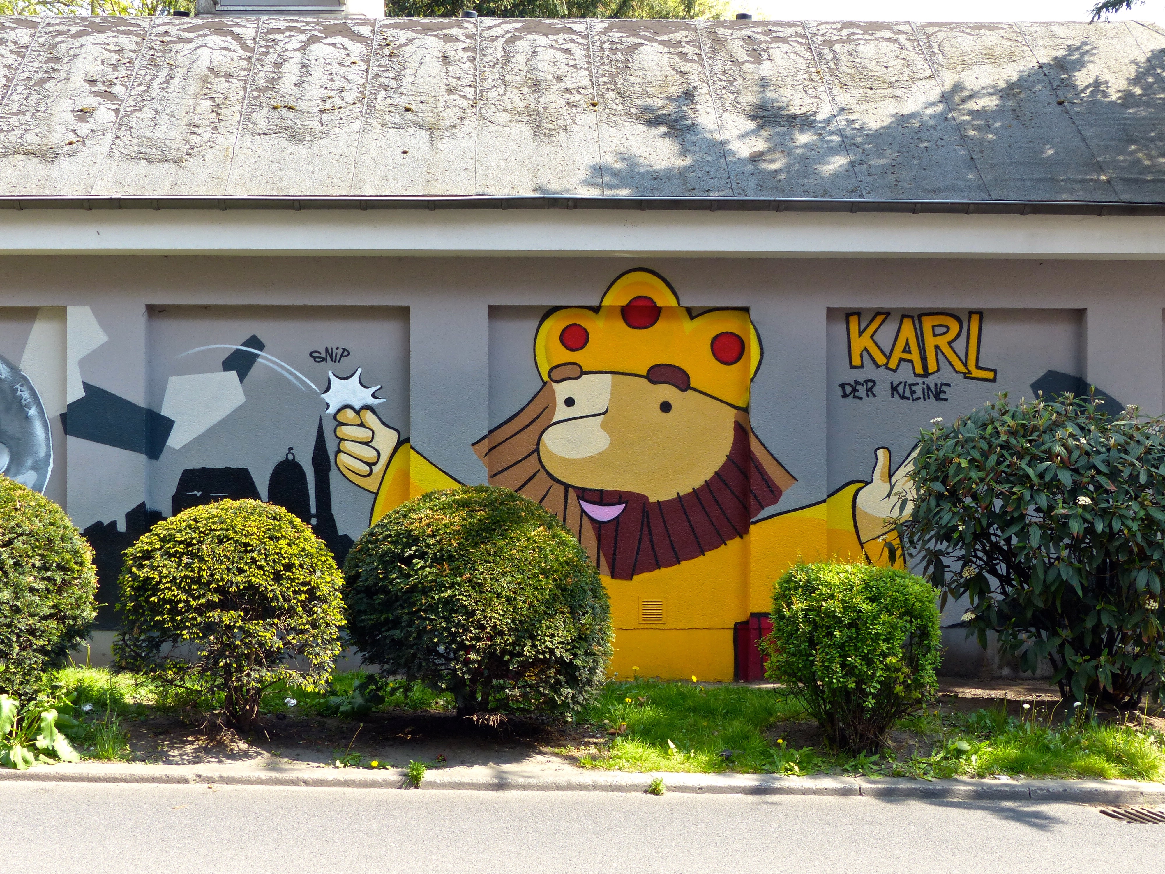 Comiciade Aachen: Graffitti am Transformatorenhaus Blücherplatz